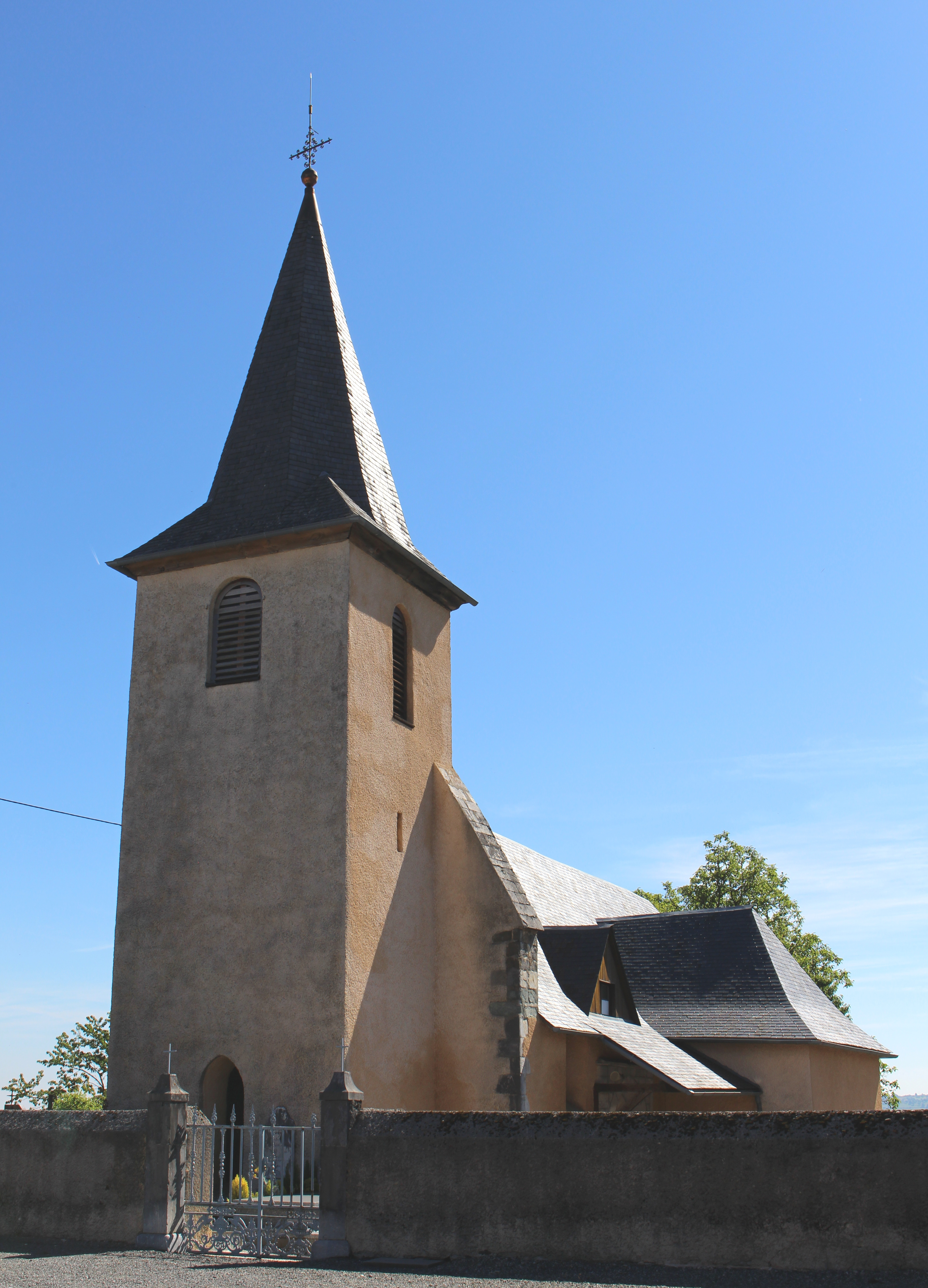 Église Saint-Laurent de Castillon (Hautes-Pyrénées)